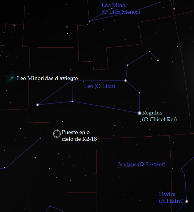 Aragonés: Puesto en o cielo de K2-18